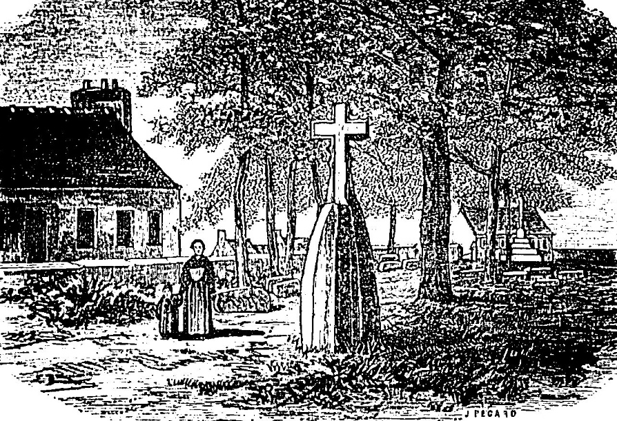 Dessin d'un menhir christianisé (lec'h) dans le cimetière de Plouarzel (Revue illustrée de Bretagne et d'Anjou, n° du 1er décembre 1886)